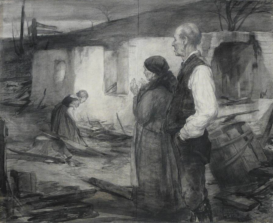 Am Bauernhaus; schwarze Tusche über Bleistiftzeichnung auf Papier, auf Karton aufgetragen, unten rechts signiert und datiert "Löfftz 1892", mittig vertikaler Knick, ca. 50 x 60 cm.